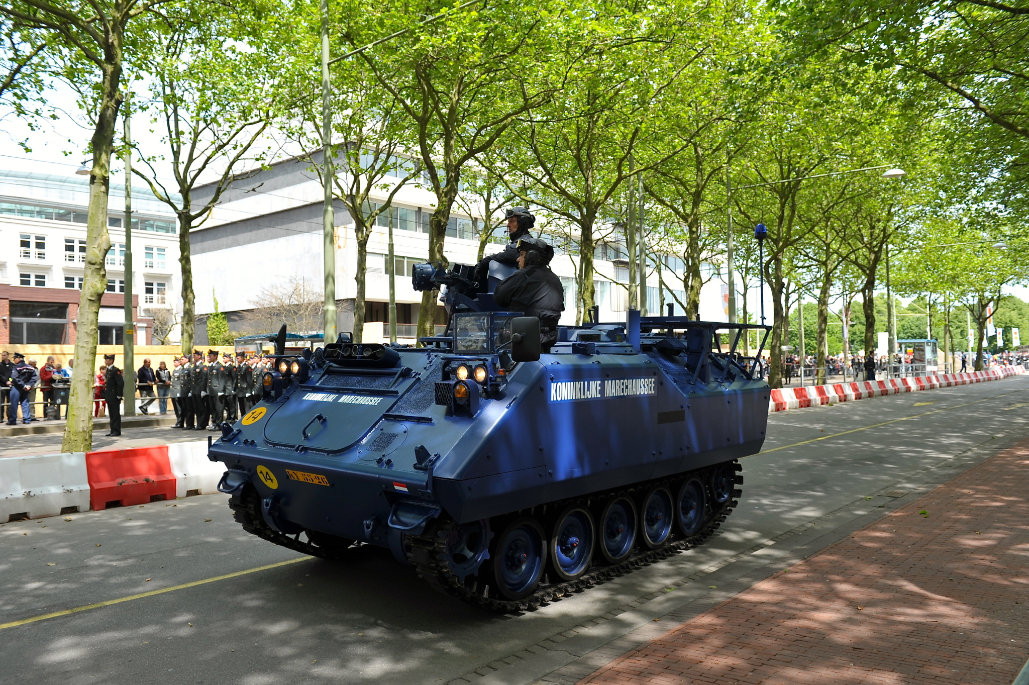 YPR-765 KMar pantserrupsvoertuig (Koninklijke Marechaussee).